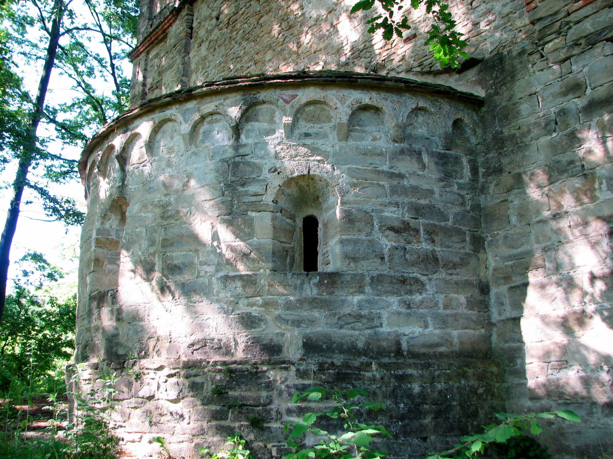 Abside tardo-romanica della cappella di S. Ponzio di Marsaglia